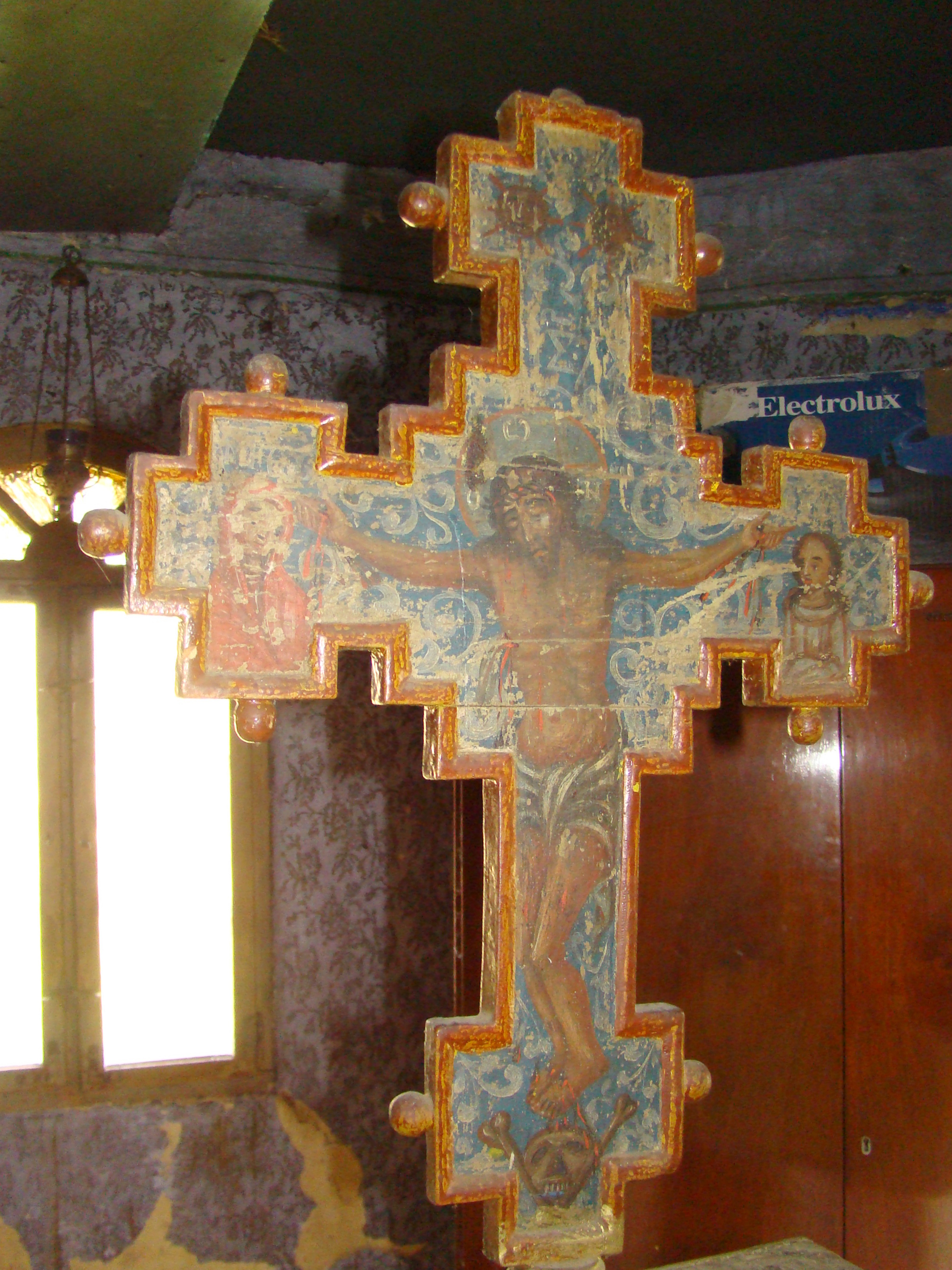 Biserica de lemn „Nașterea Maicii Domnului” din Săucani, județul Bihor